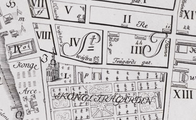 Västra Trädgårdsgatan, Kockgsgränd m.fl. på Petrus Tillaeus karta från 1733, norr är till höger.